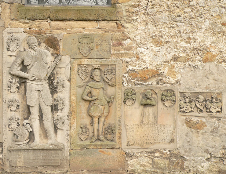 Grabplatten an Außenfassade der Kirche in Oelber am weißen Wege